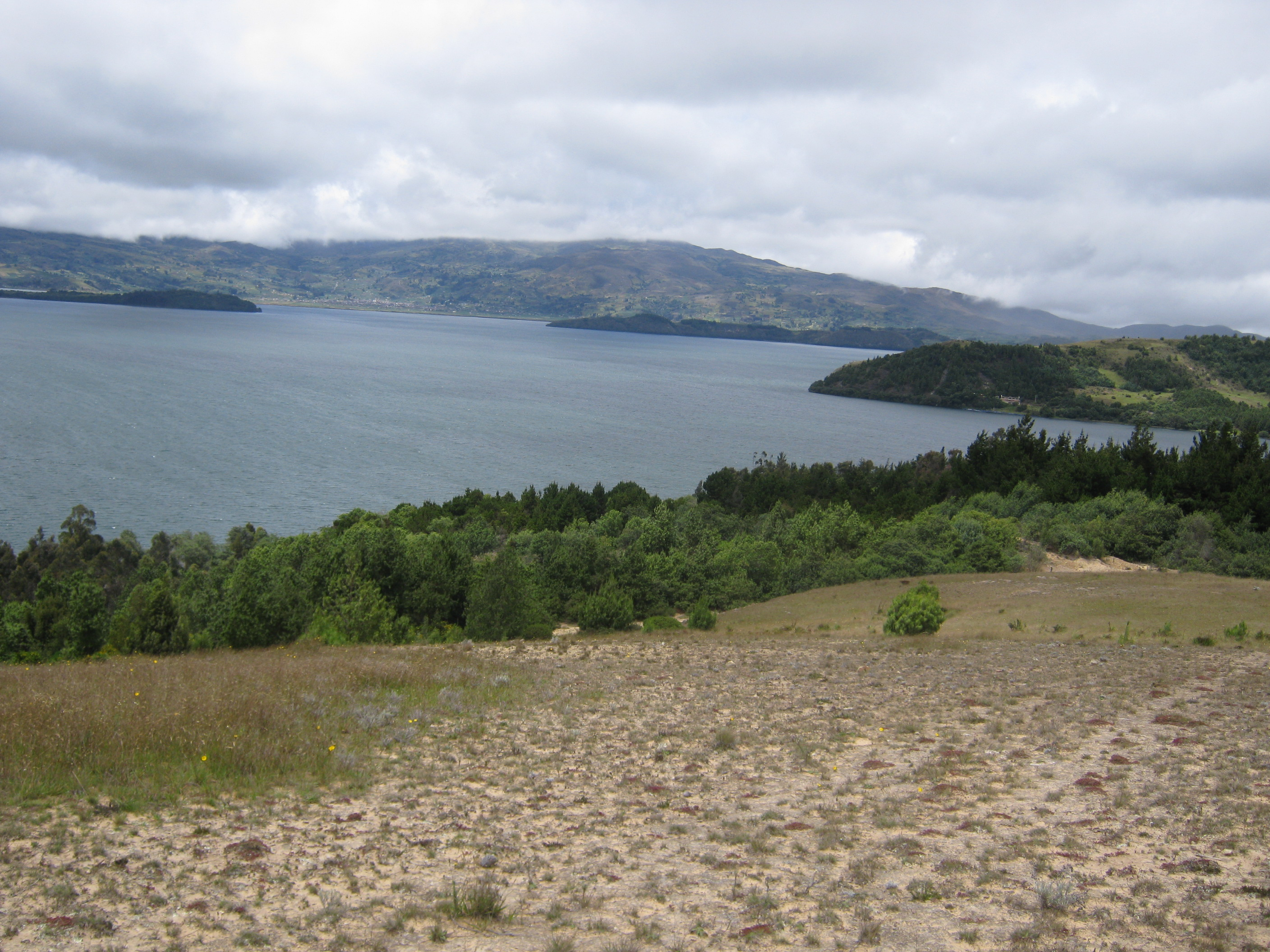 Lago de Tota, vista desde cerro de monserrate en Cuítiva